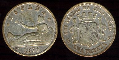 1 peseta